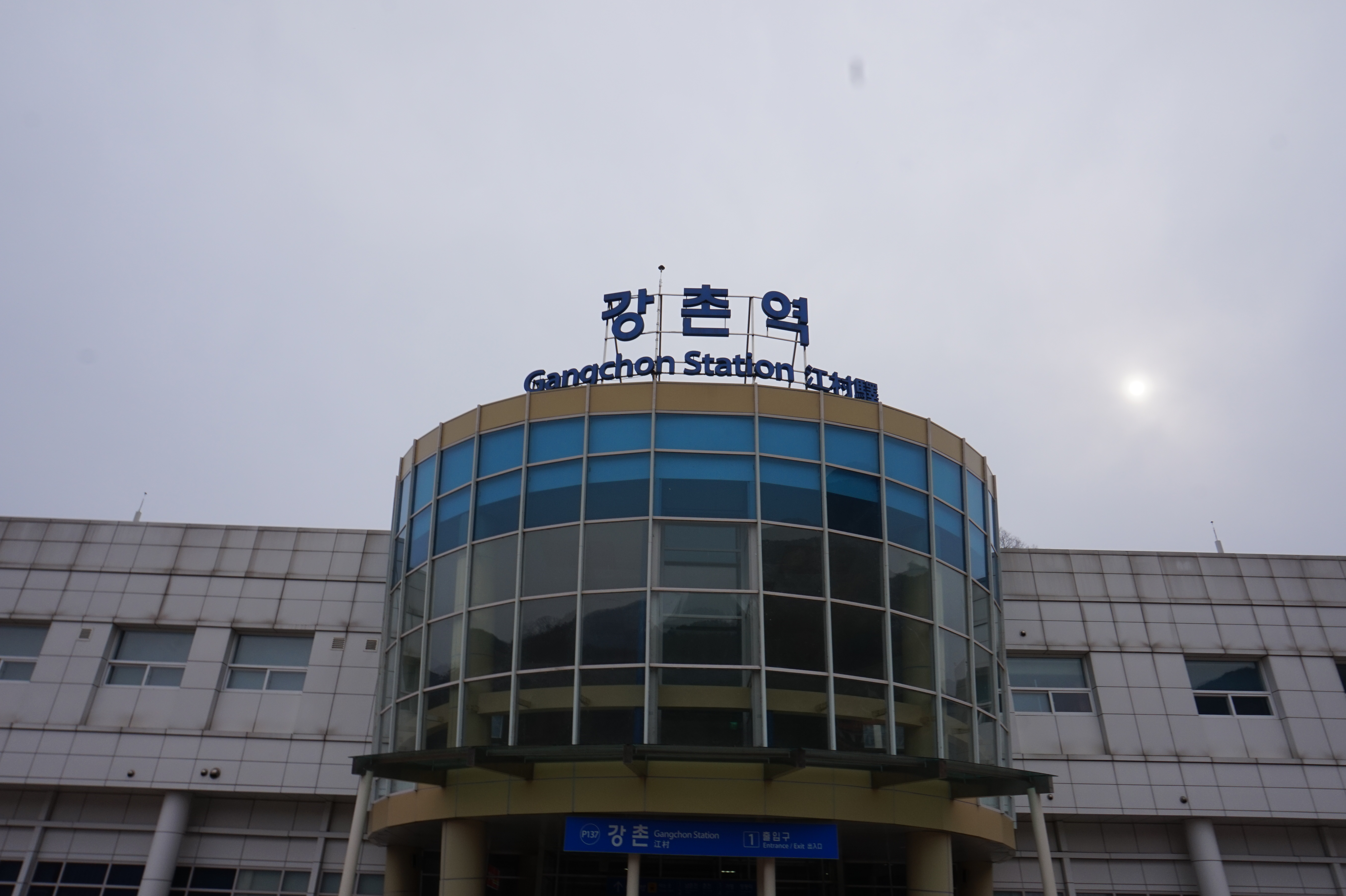 기타